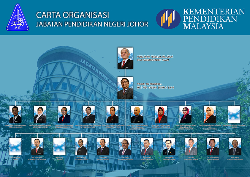 Carta Organisasi Jabatan Pendidikan Negeri Johor 2016